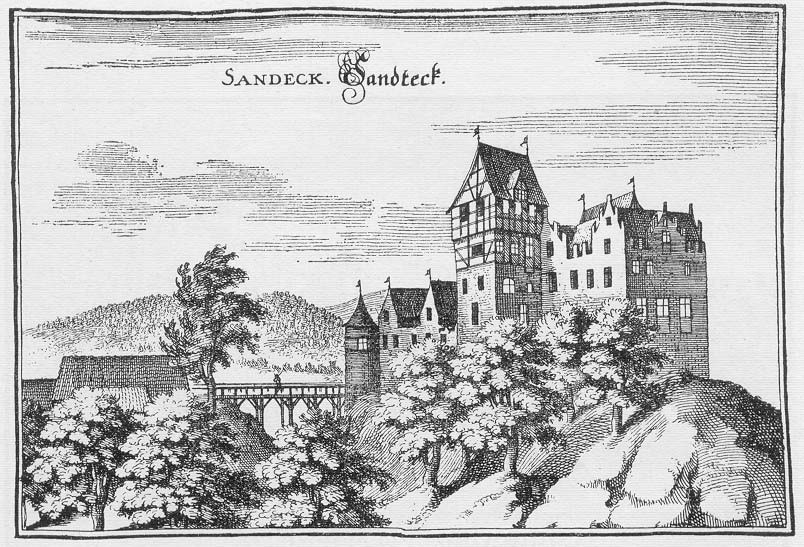 Schloss Sandegg Kupferstich, Format 12 x 17 cm